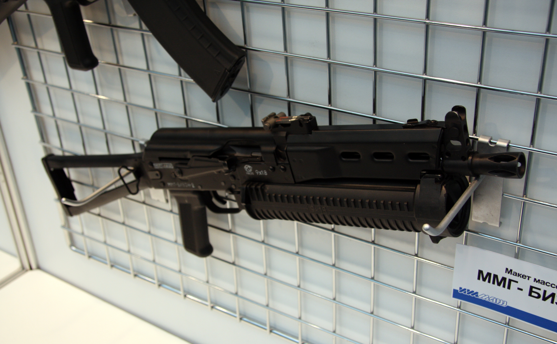 Бизон-2